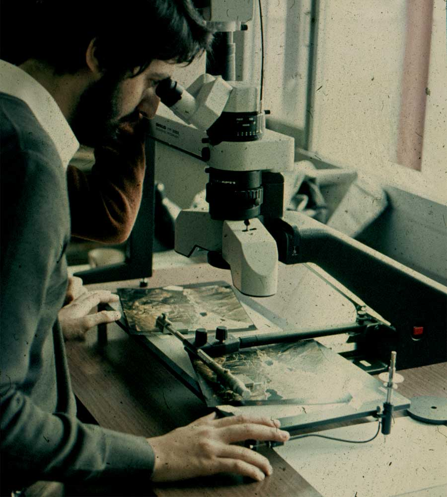 Stereomicrometro applicato allo stereoscopio Wild APT1